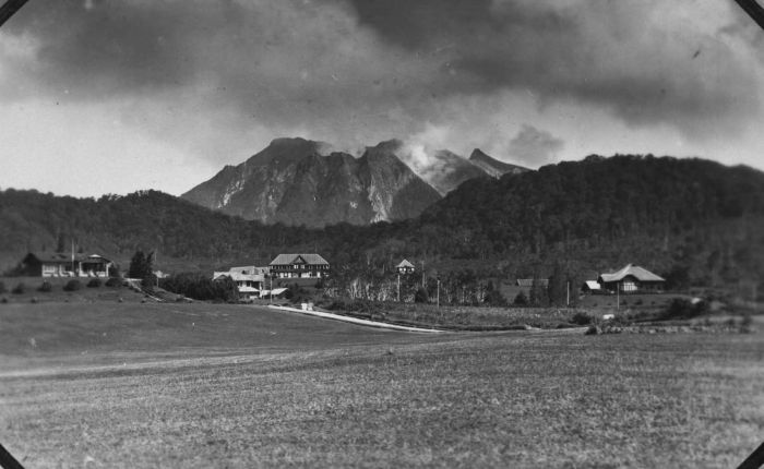 Foto. Hotel Brastagi aan de voet van de vulkaan Sibayak